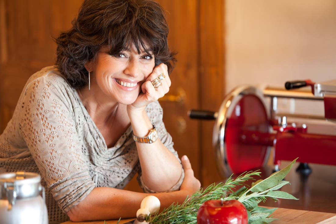 Valeria Benatti